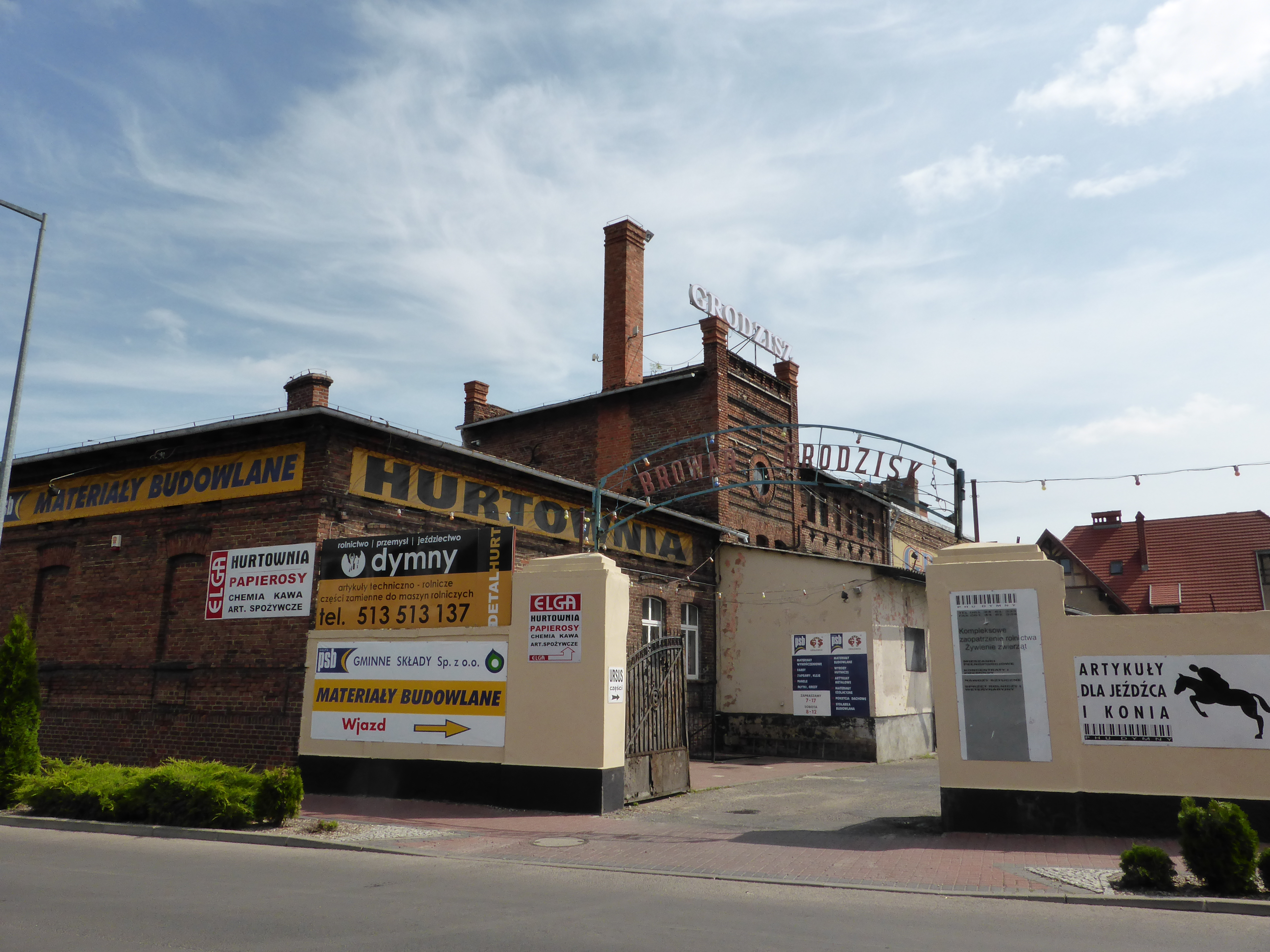 Old brewery building in Grodzisk Wlkp. (Poland)